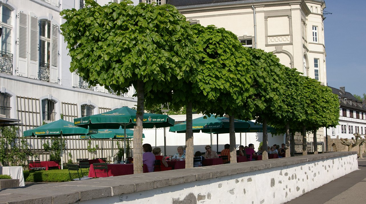 Rheinterrasse in Engers, mit Blick auf den Biergarten vor dem Schloss Engers (links) und dem Gebäude des ehem. Meisterhauses